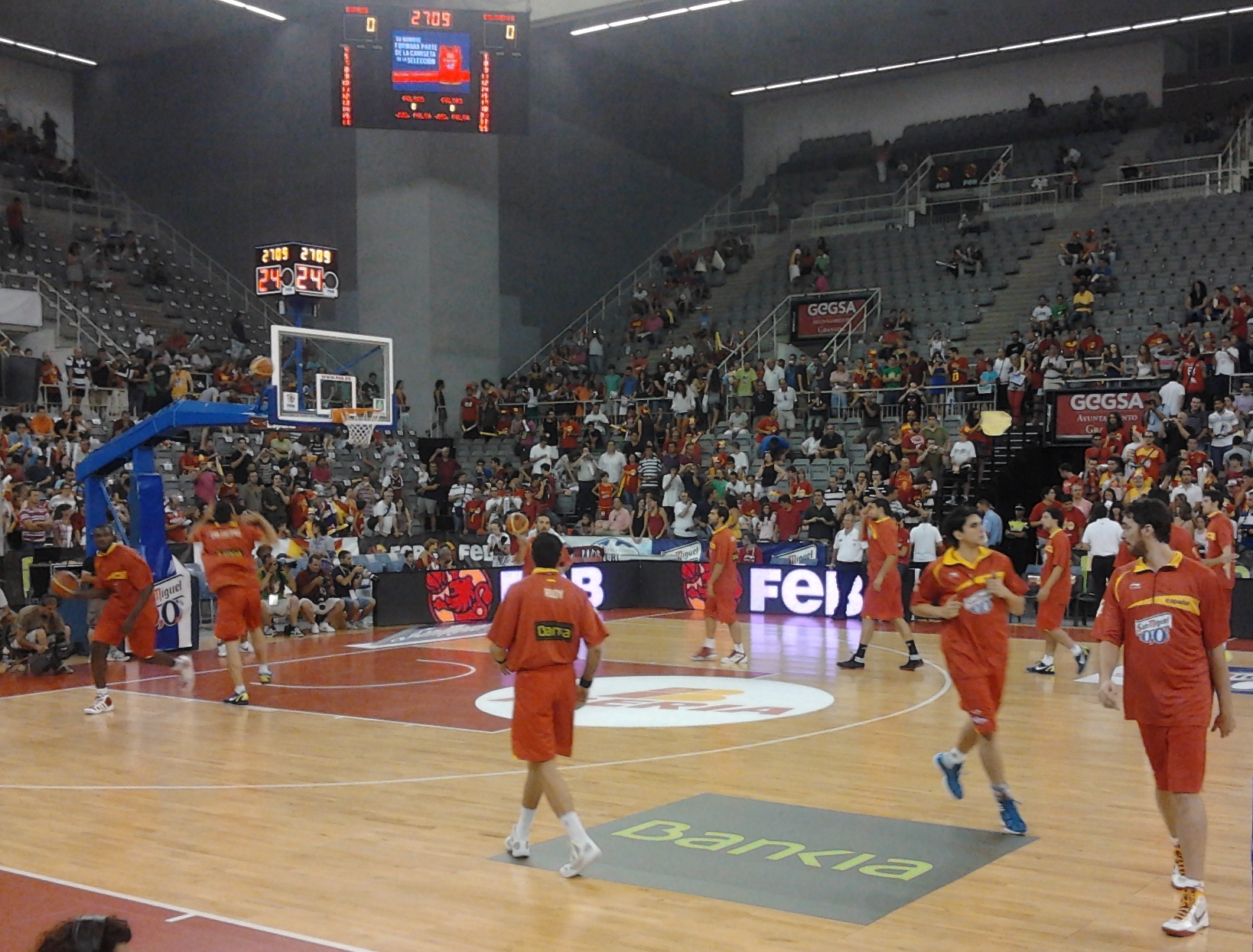 Rueda de calentamiento en Granada (España-Eslovenia)